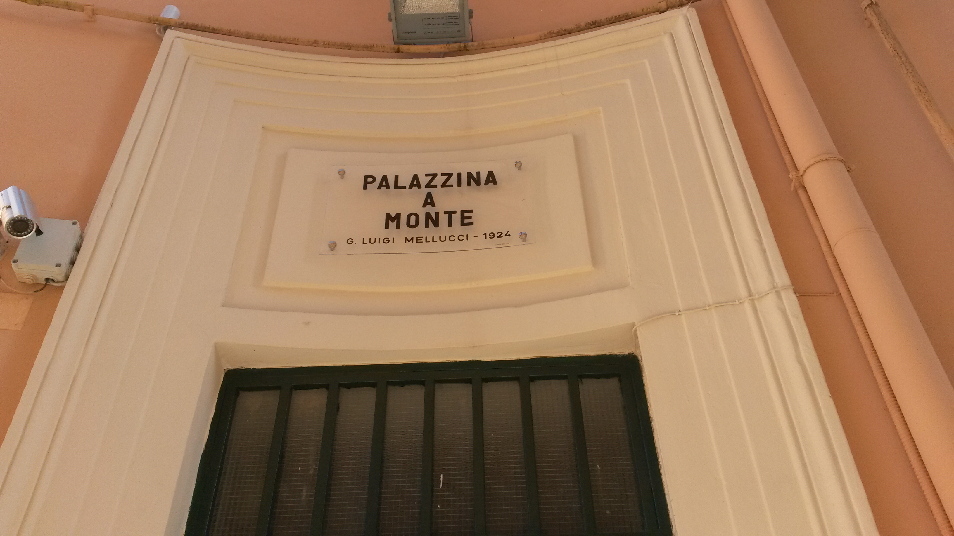 Palazzina a Monte -Villino Mellucci al Petraio ,Napoli - 1924